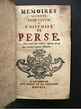 Memoires secrets pour servir a l'histoire de Perse. Aux depens de la Compagnie, à Amsterdam 1745, pet. in-8, relié. Édition originale, page de titre en rouge et noir, reliure en demi basane rouge fin XVIIIe, dos à nerfs décoré de filets maigres et gras. Pièce de titre de maroquin brun.